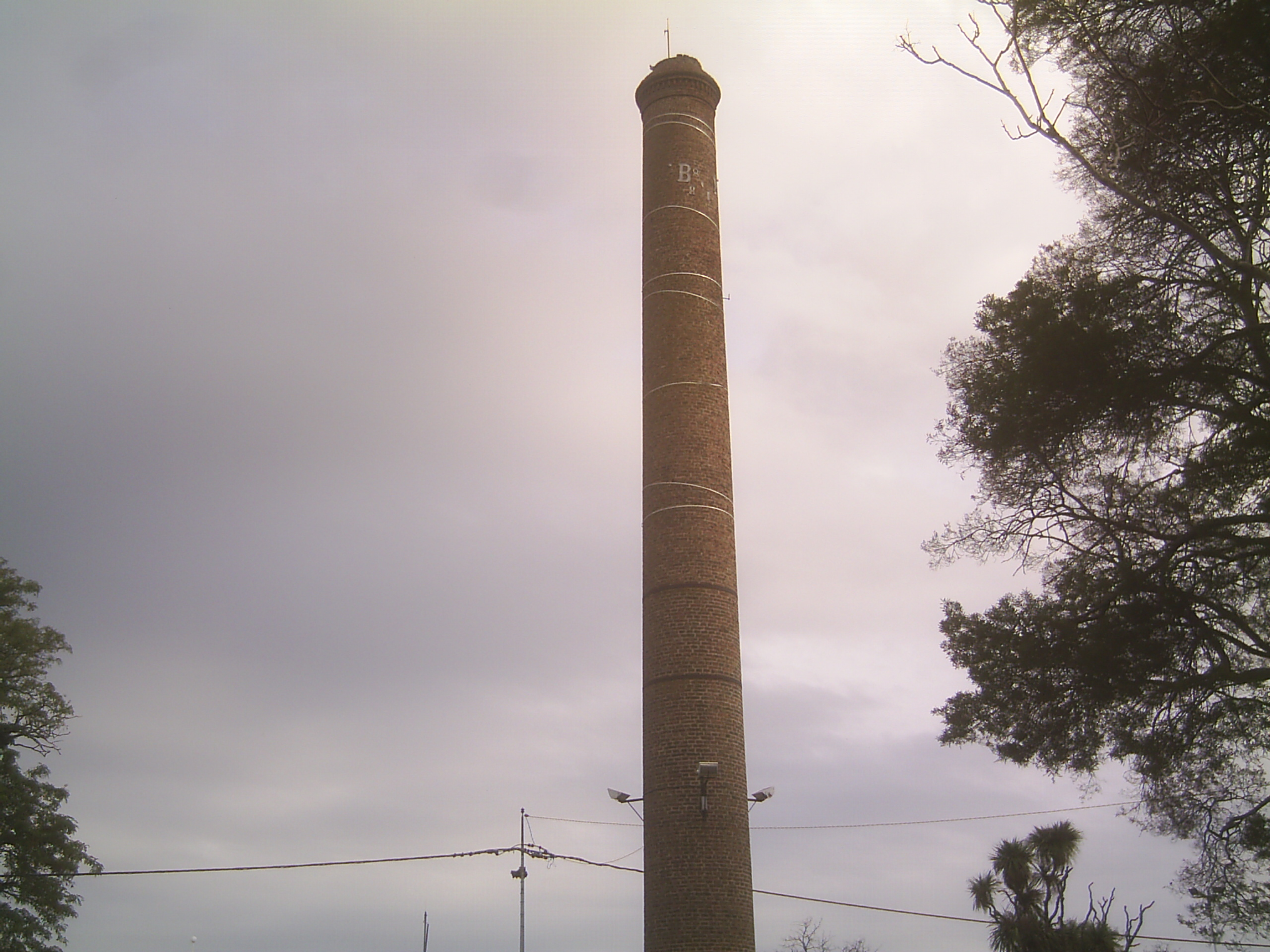 Molino de cereales de Juan Fugl